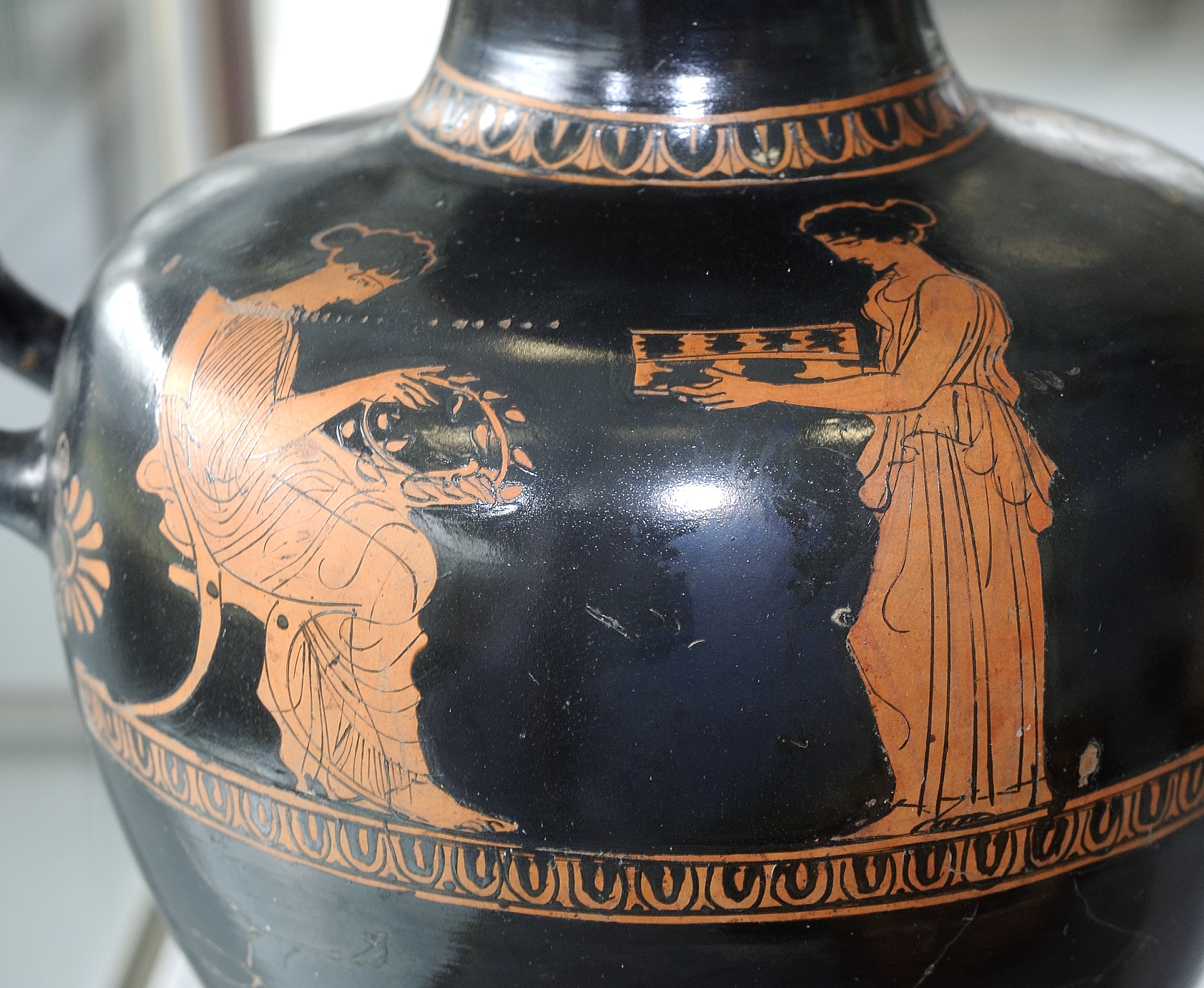 Hydria des Schuwalow-Malers aus Capua. Antikenmuseum der Universität Heidelberg